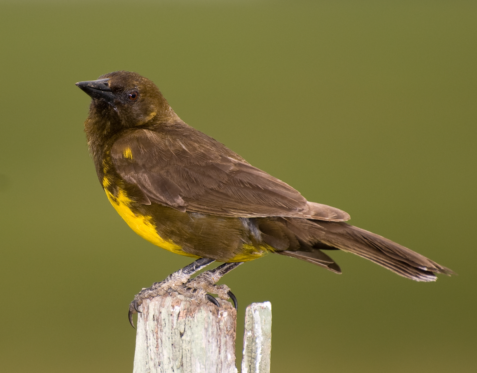 PECHO AMARILLO(Pseudoleistes virescens) Fotografia tomada en el departamento de Salto (Uruguay).